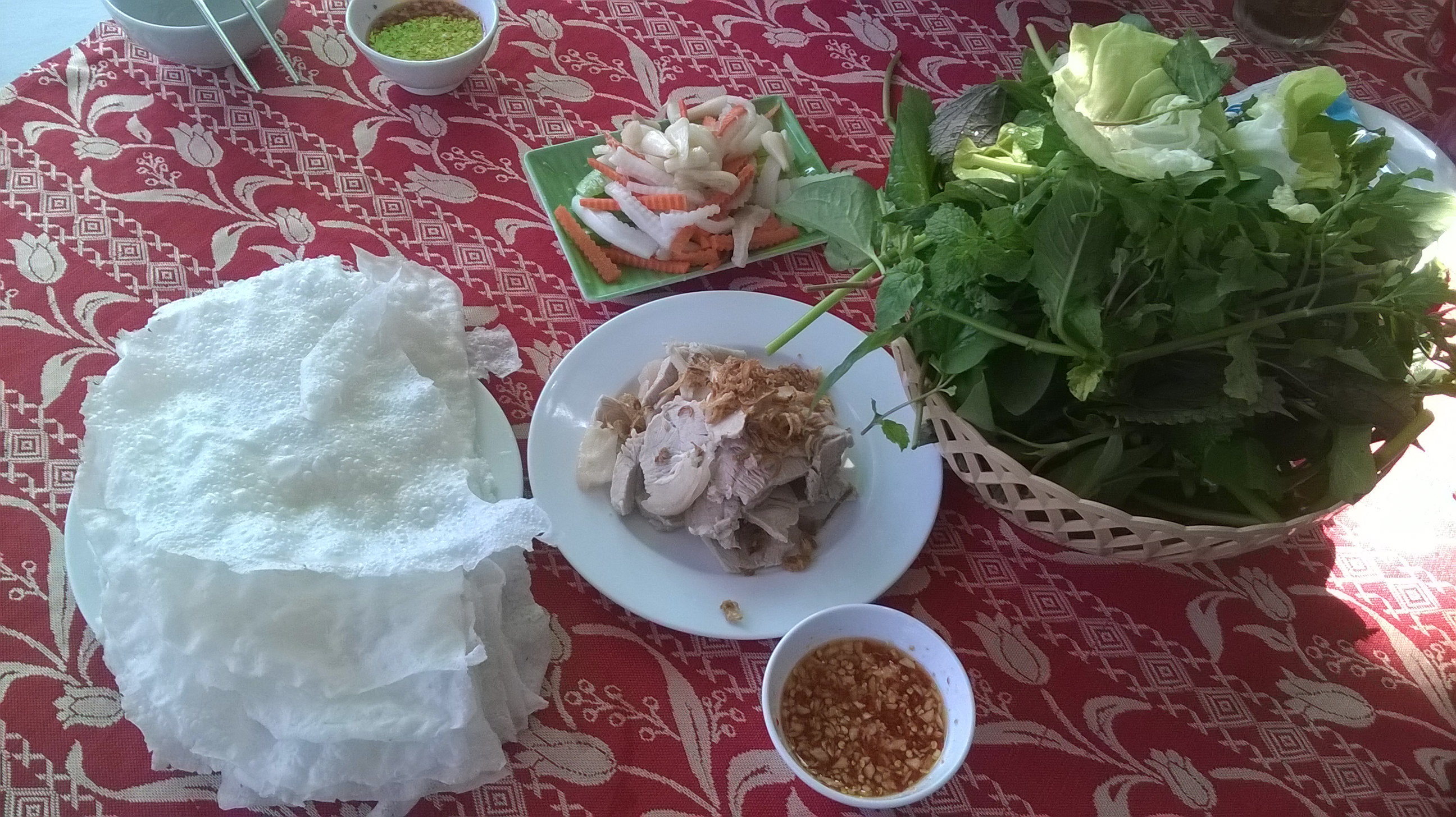 Galette de riz TB